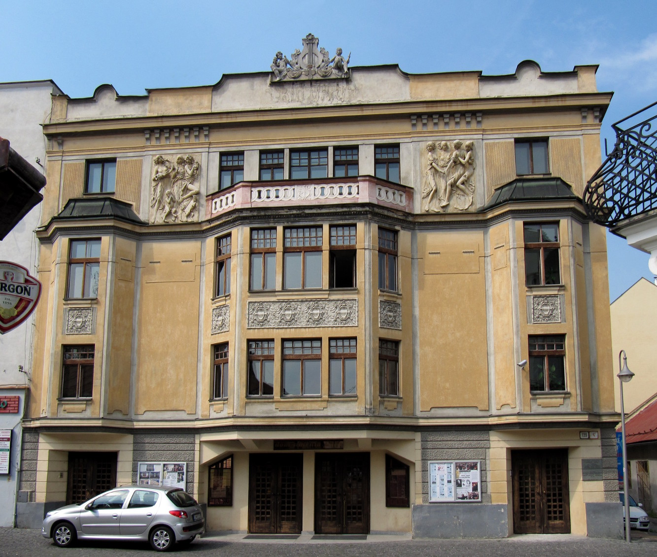 Žilina, Dom umenia Fatra